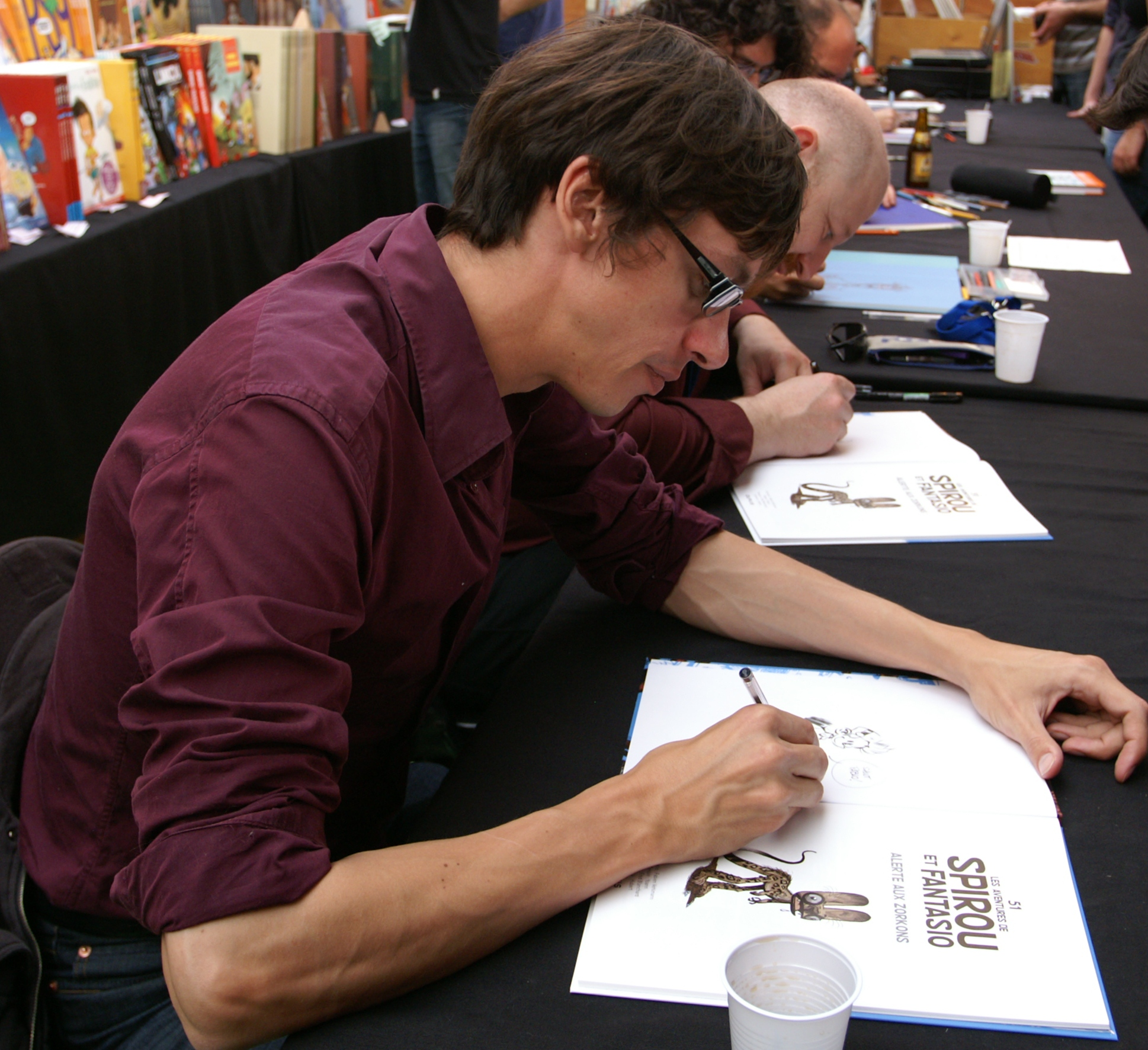 Fabien Vehlmann, au festival Quai des Bulles à Saint-Malo en 2010, avec Yoann en arrière-plan.